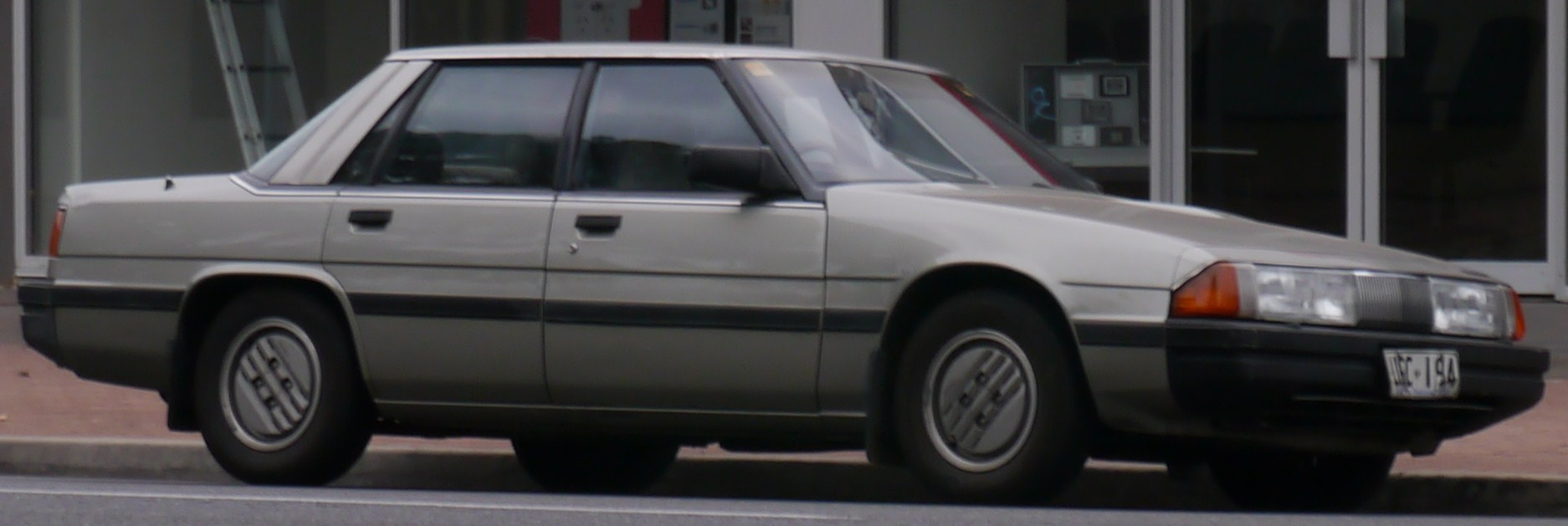 1982 Mazda 929